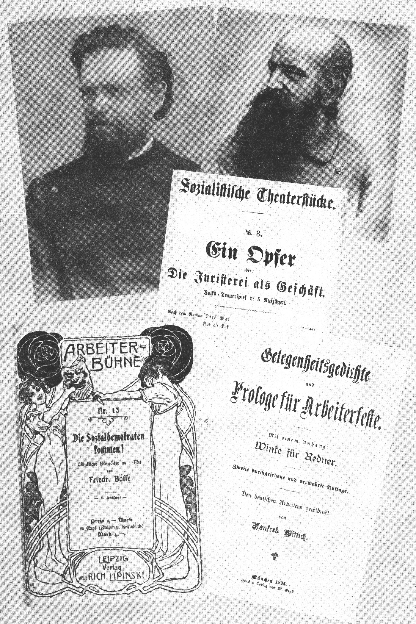 Heinrich Christoph Friedrich Bosse links. Manfred Wittich rechts und Plakate